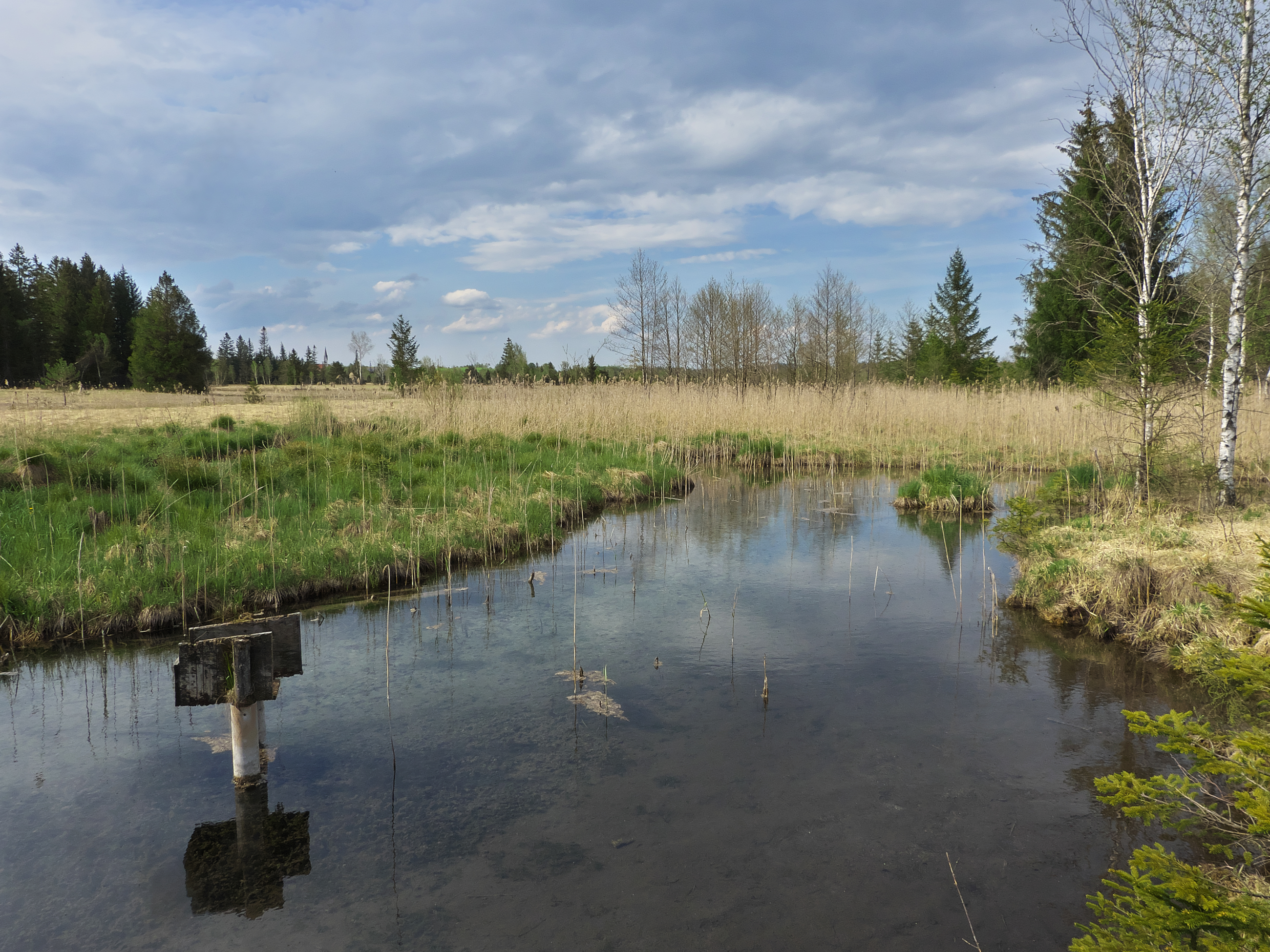 Ellbach bei Bad Tölz - Mai 2016 - Naturschutzgebiet Ellbach- und Kirchseemoor